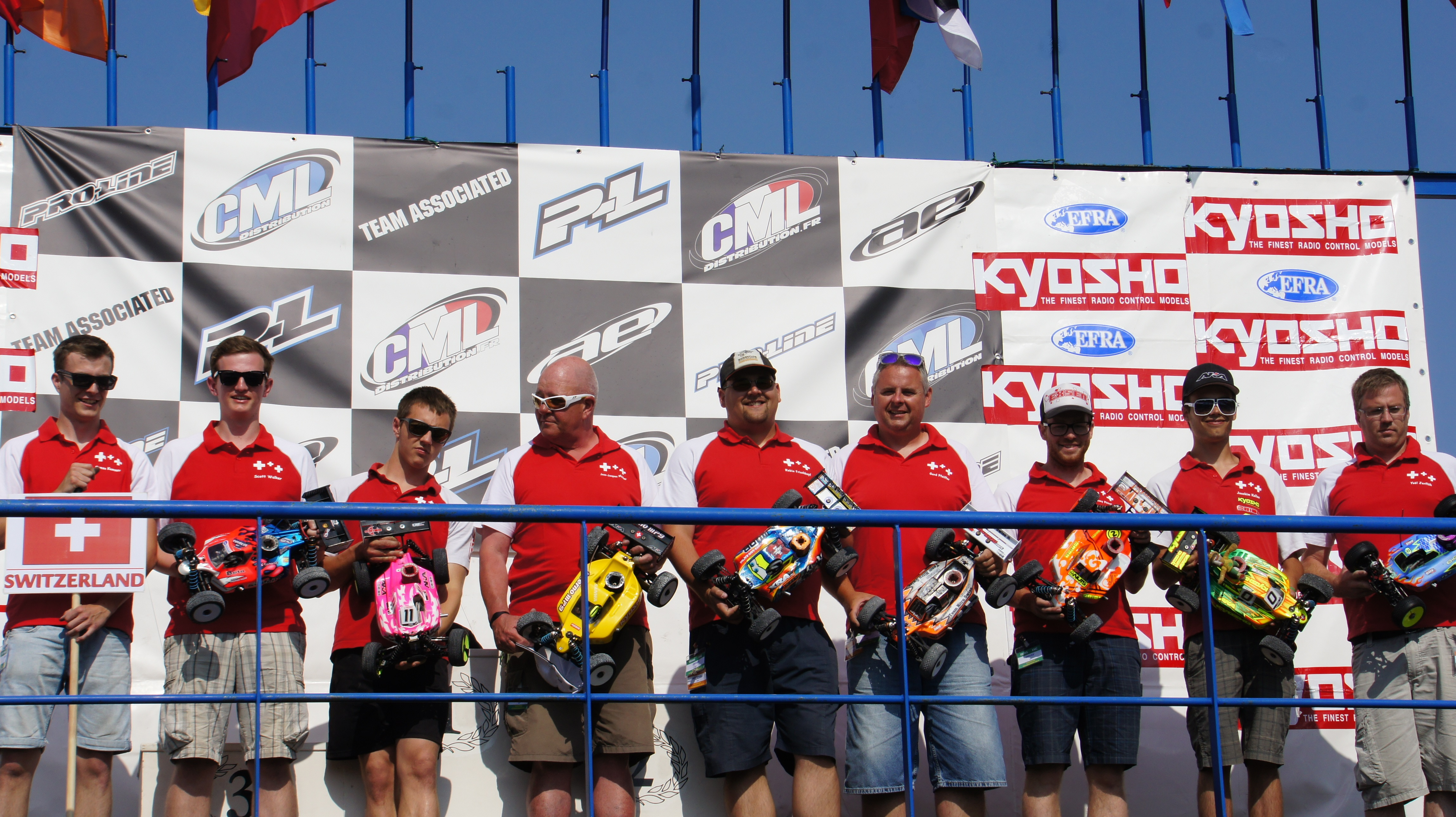 Présentation des équipes lors du Championnat d'Europe EFRA 2013 à Reims.